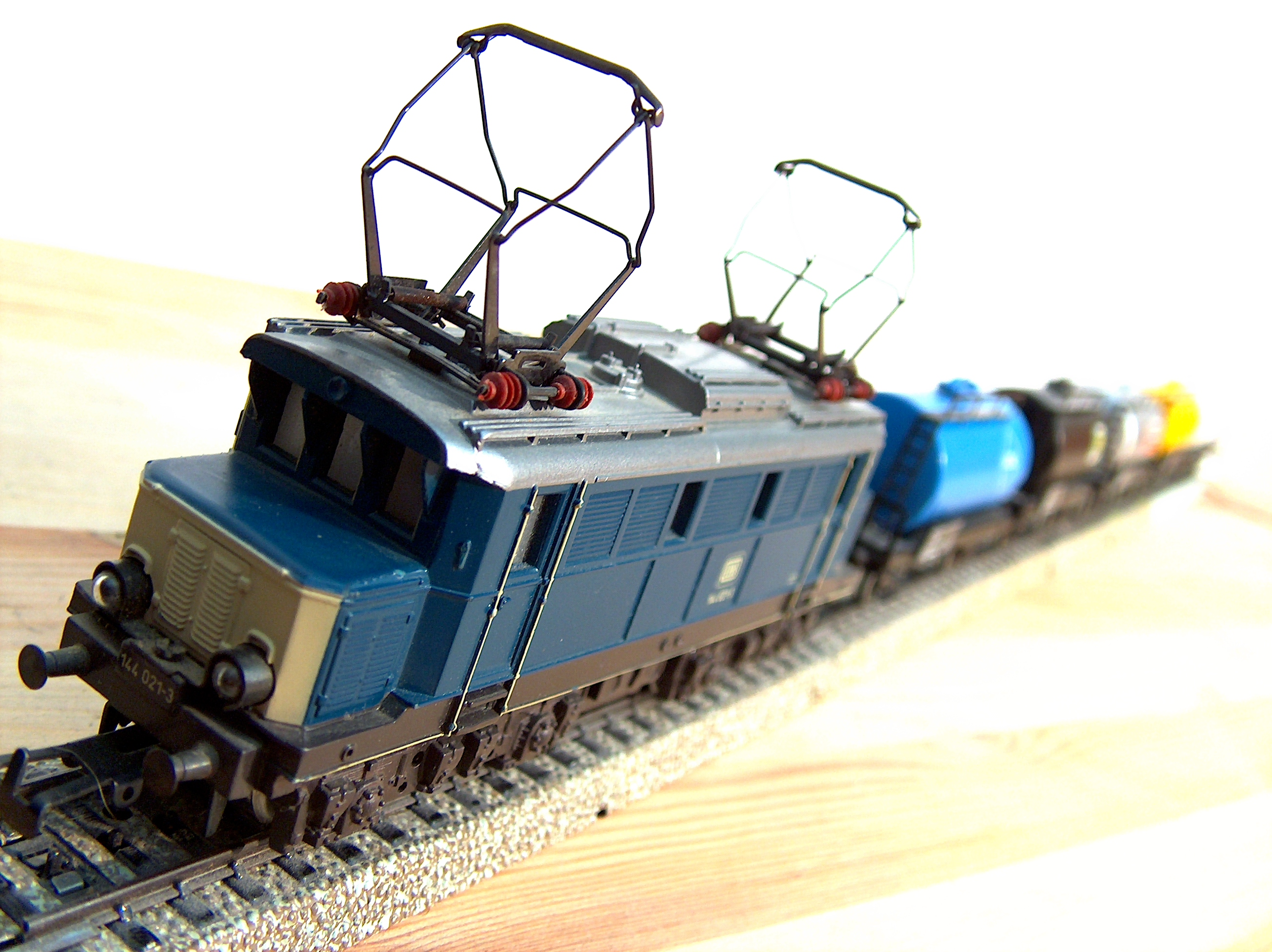 Model train Märklin Primex Jubiläumszug 1969-1989 (2702)